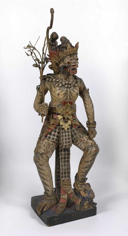 Beeld. Hanuman is de generaal van het apenleger en speelt een prominente rol in het Ramayana epos. Dit beeld behoort tot een groep van 28 beelden (15-156 t/m 15-182b), gezamenlijk een pantheon van Balinese godheden vormend, dat getoond werd op de Nederlandse koloniale afdeling op de wereldtentoonstelling te Parijs in 1900. Speciaal voor deze tentoonstelling heeft C.M. Pleyte, conservator van 's Rijks Etnografisch Museum in Leiden, deze beelden op Bali laten vervaardigen. Met behulp van enkele priesters selecteerde hij de relevante beelden die vervolgens door Balinese houtsnijders werden nagemaakt.. Houten beeld van Hanuman